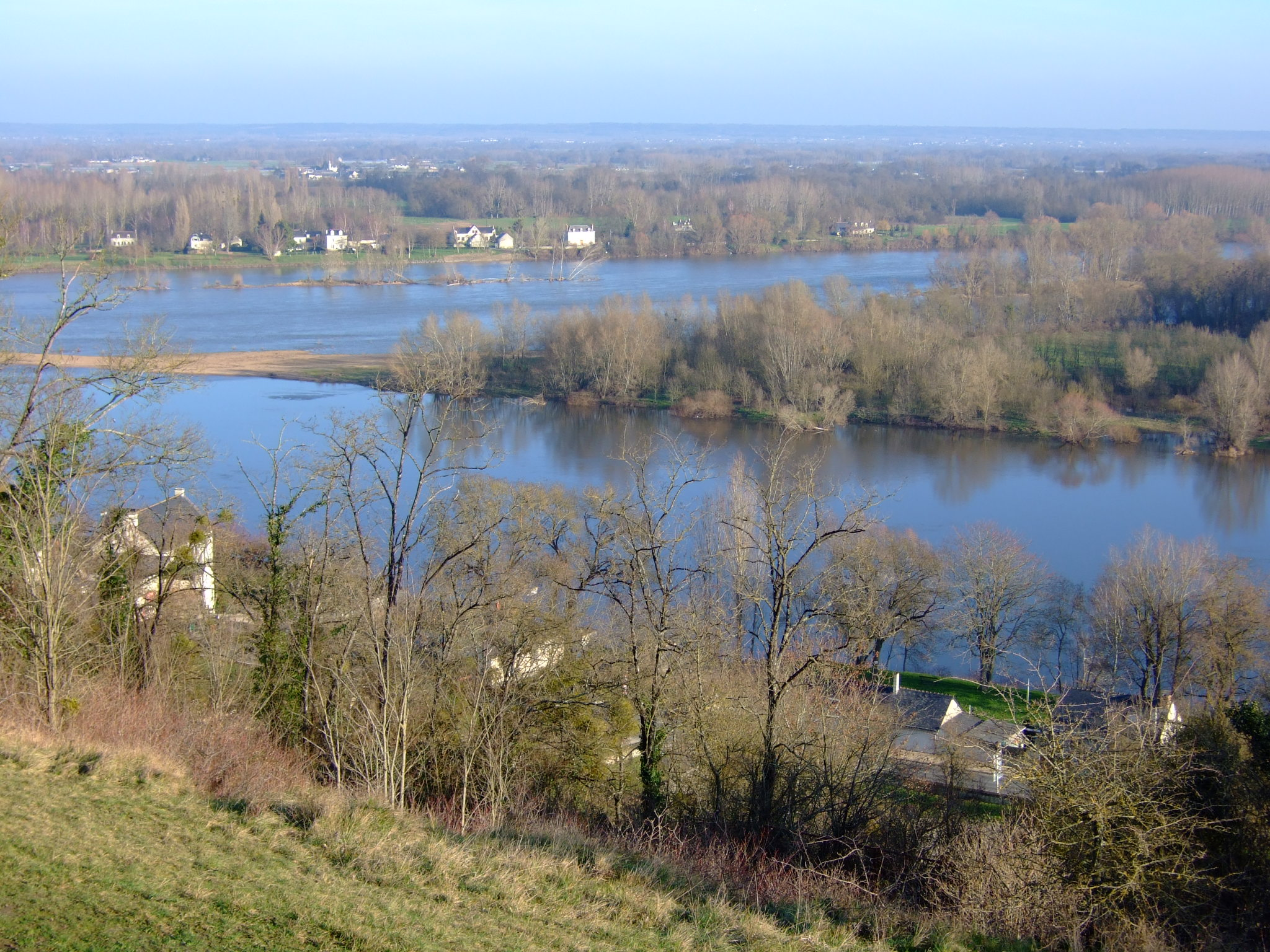 Le confluent de la Vienne et de la Loire à Candes-Saint-Martin